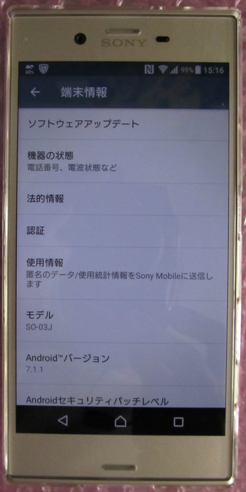 SONY Xperia XZs SO-03J クリアケース装着